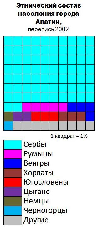 Этнический состав населения города Апатин (2002)